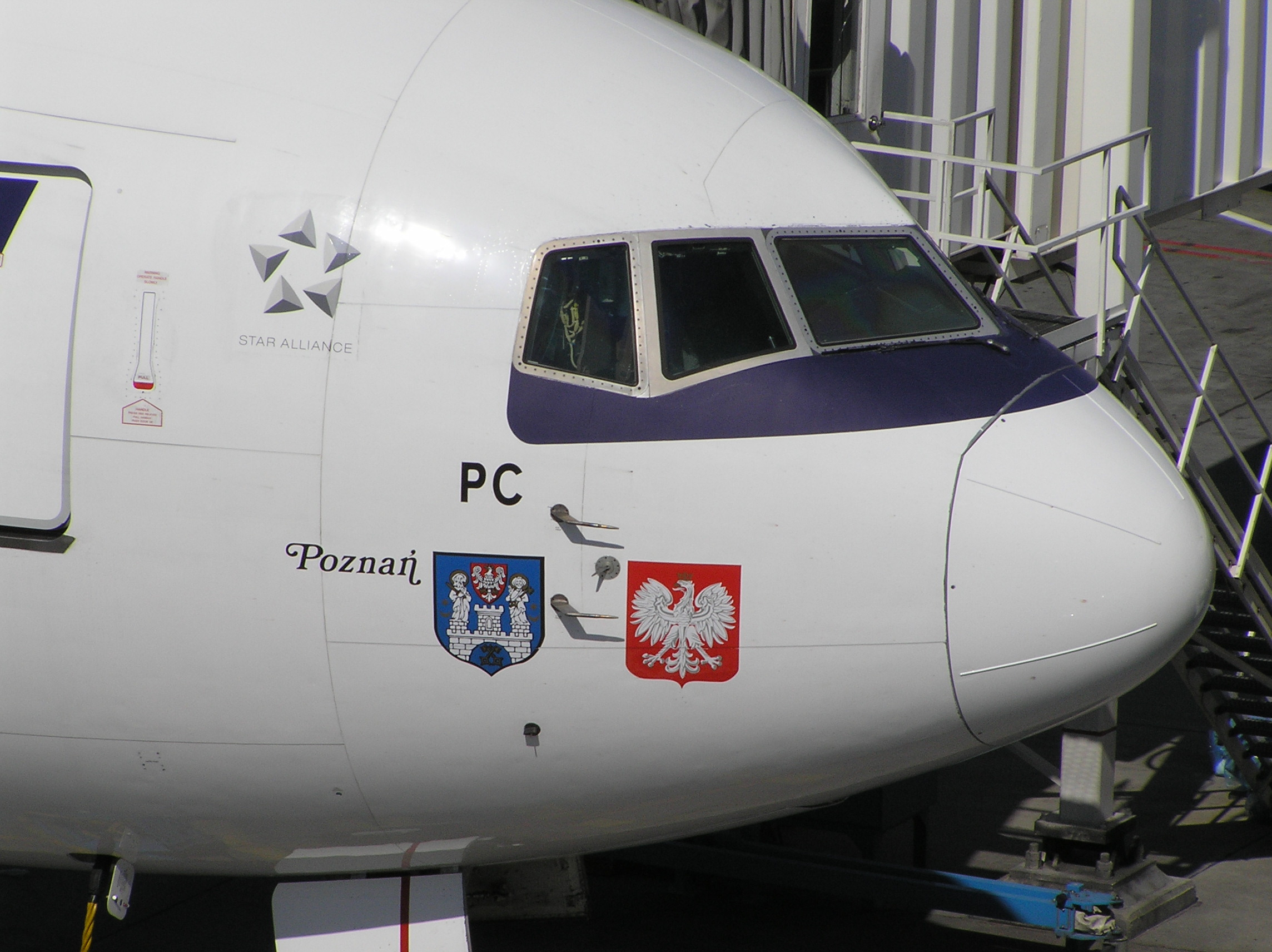 Samolot Boeing 767-300 "Poznań" (SP-LPC).